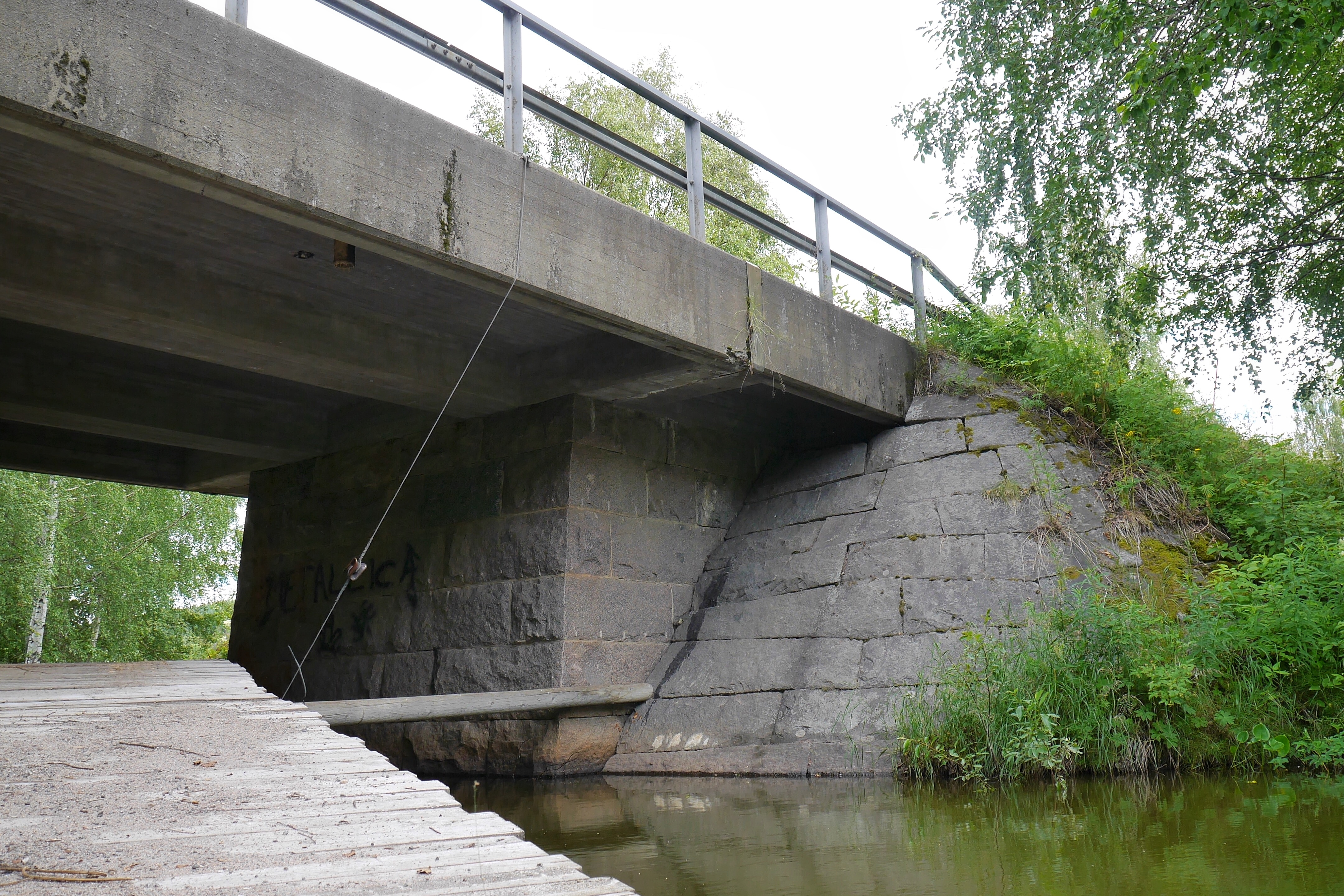 Bro över Vittjärvsträskets utlopp i Vittjärv, Boden. Bron är klassad som kulturhistoriskt värdefull. Bronummer: BD 287 Byggår: 1935. Längd: 13,5 meter Spännvidd: 5,9 meter Bredd: 7,0 meter